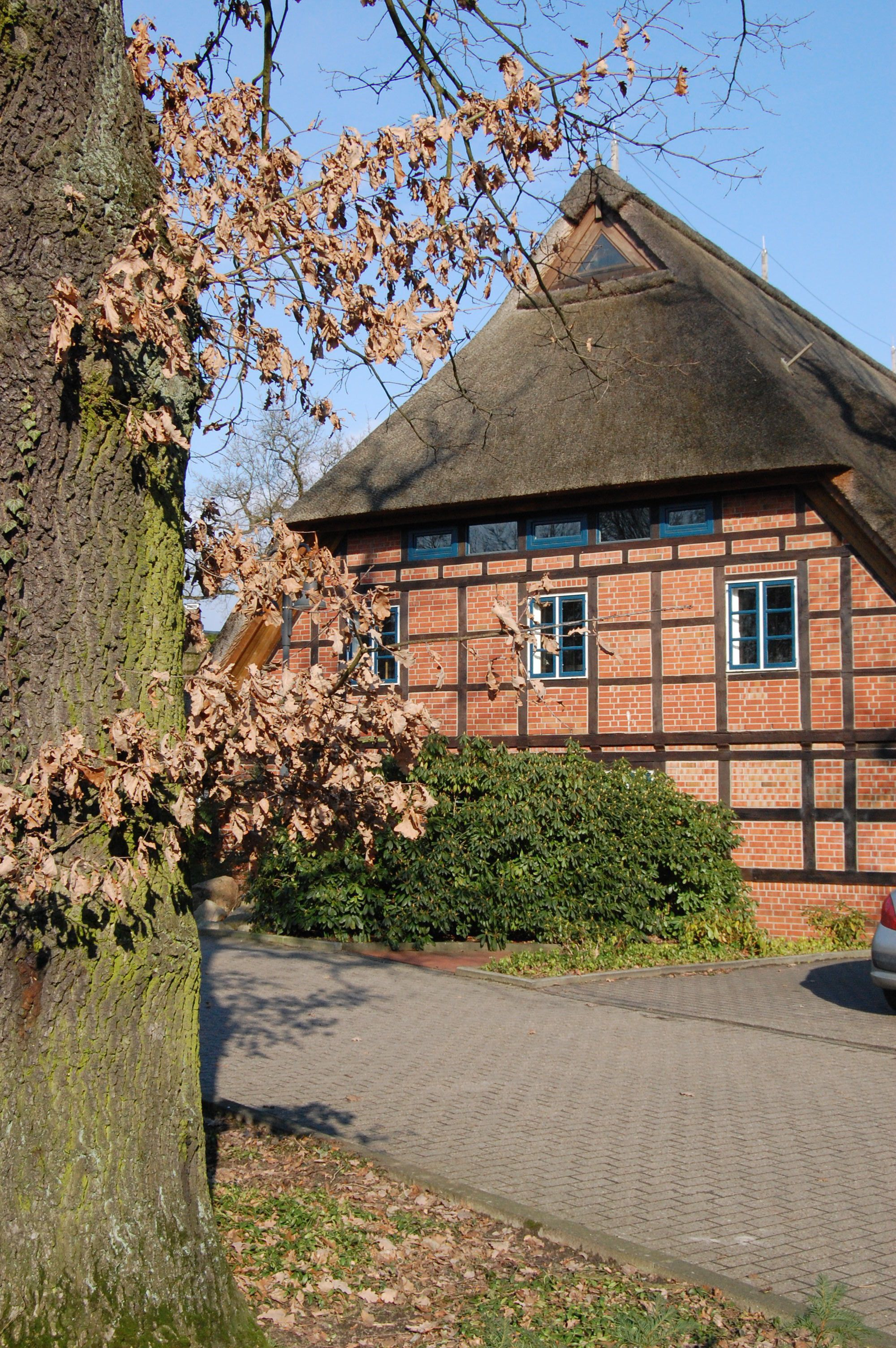 Fachwerkhaus in der Gemeinde Seevetal, Bücherei in Meckelfeld